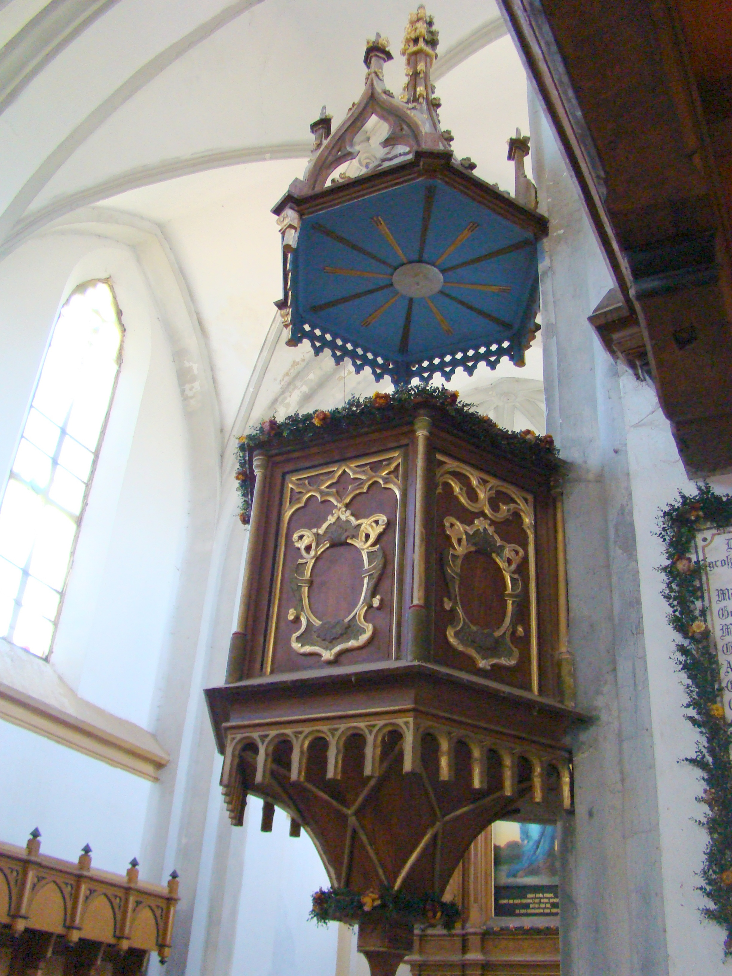 Biserica evanghelică, sat Senereuș; comuna Bălăușeri 01